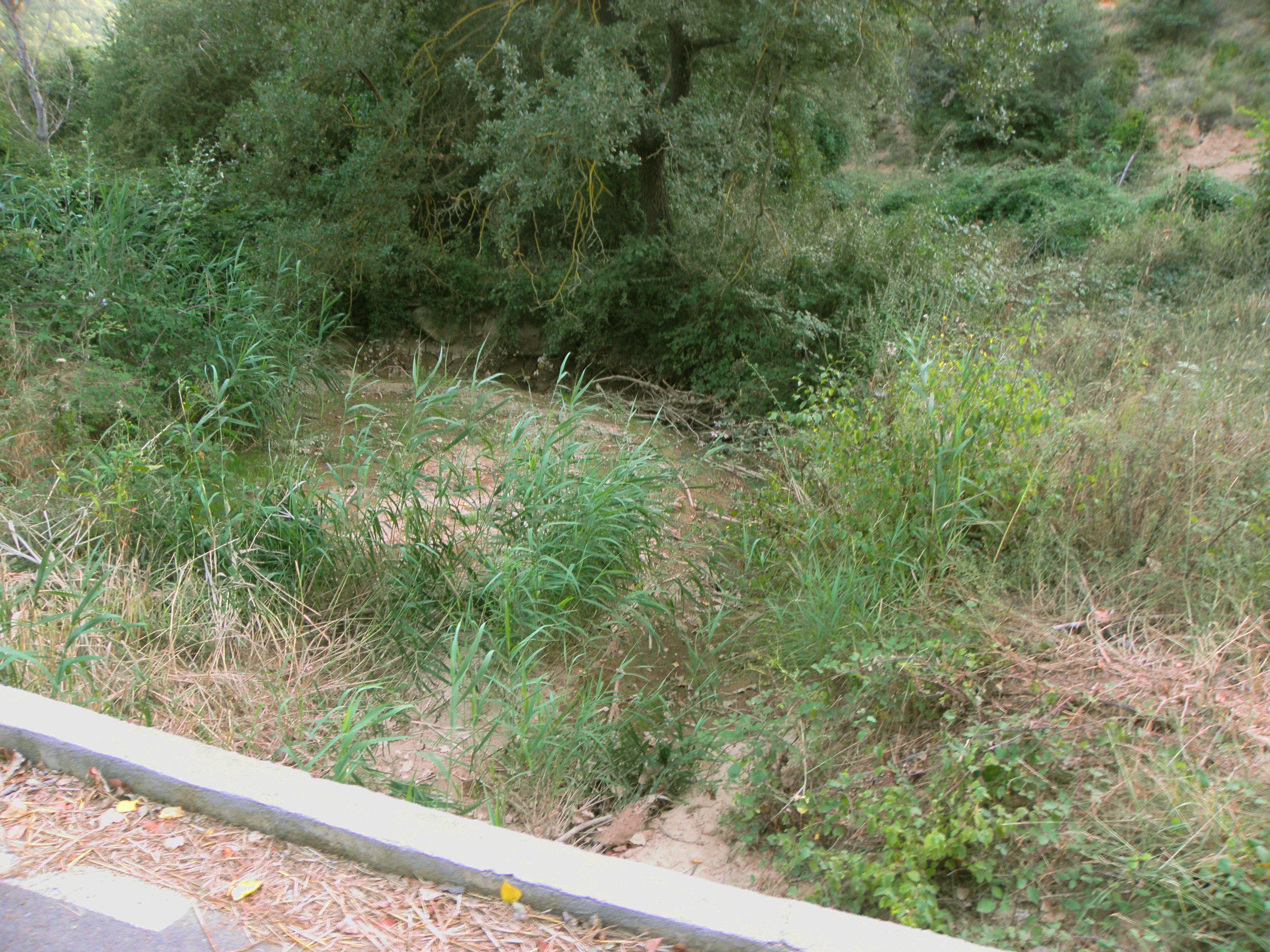 La riera de Madrona al seu pas per dota Madrona